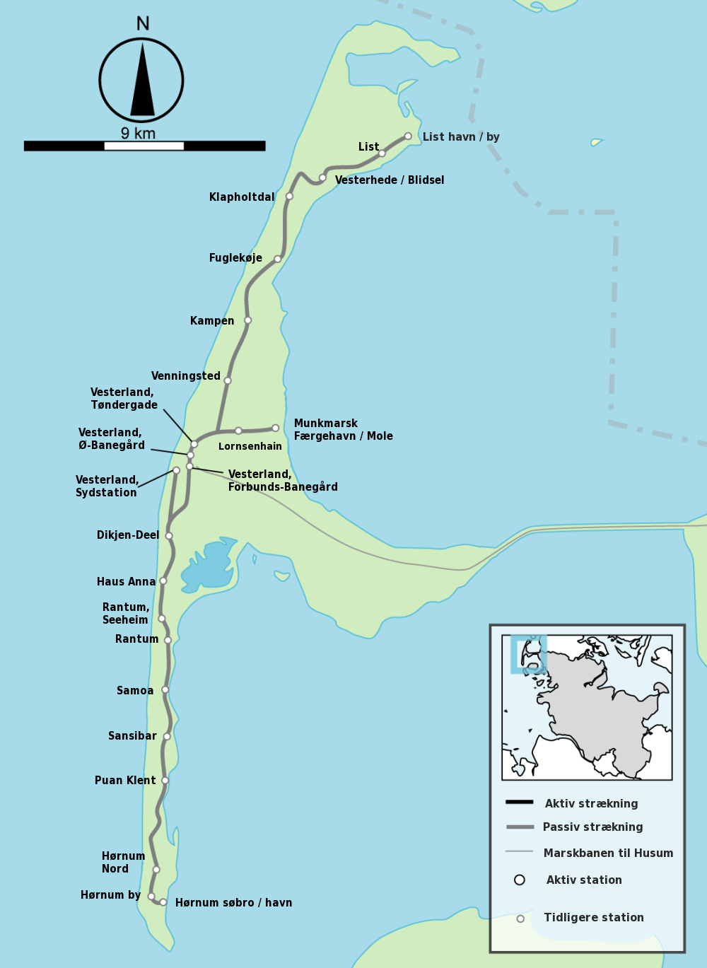 Øbanen på Sild